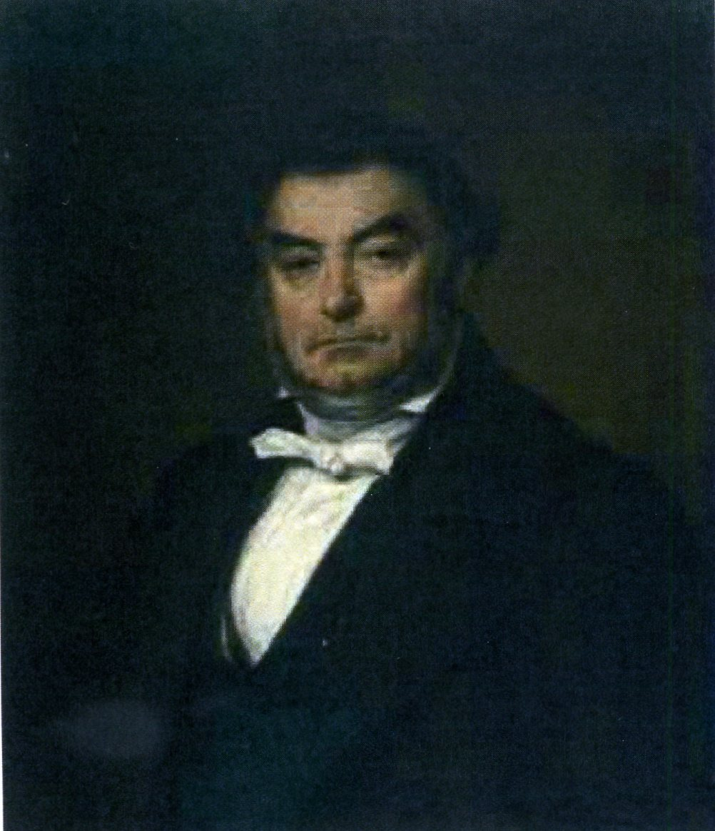 Gemälde des Dr. med. Wilhelm Zais, Wiesbaden gemalt von Benjamin Orth ca. 1850